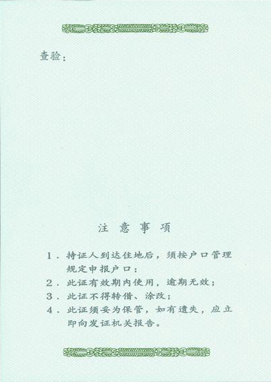 旧版单页式中华人民共和国出入境通行证封底